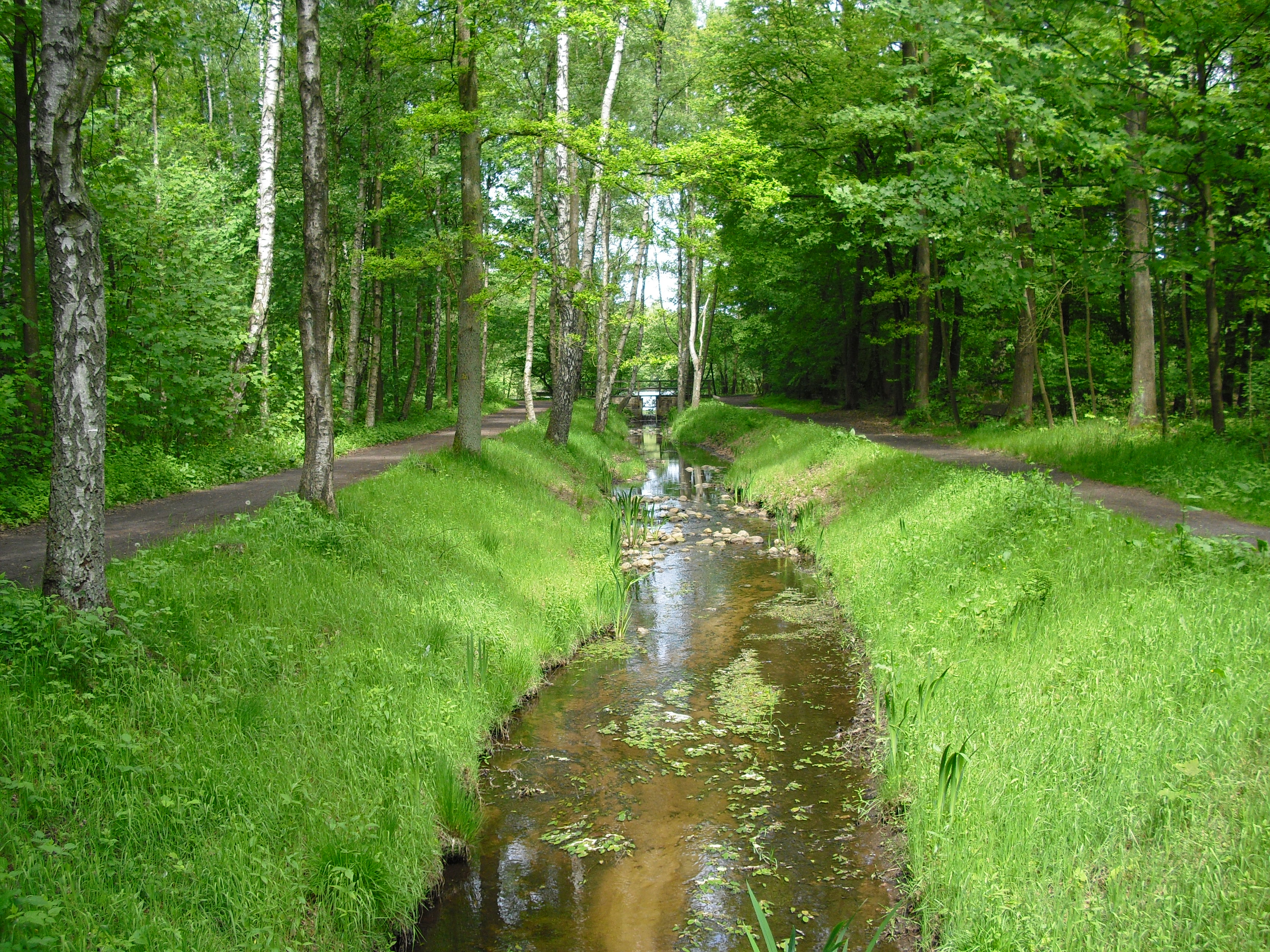 Raakmoor